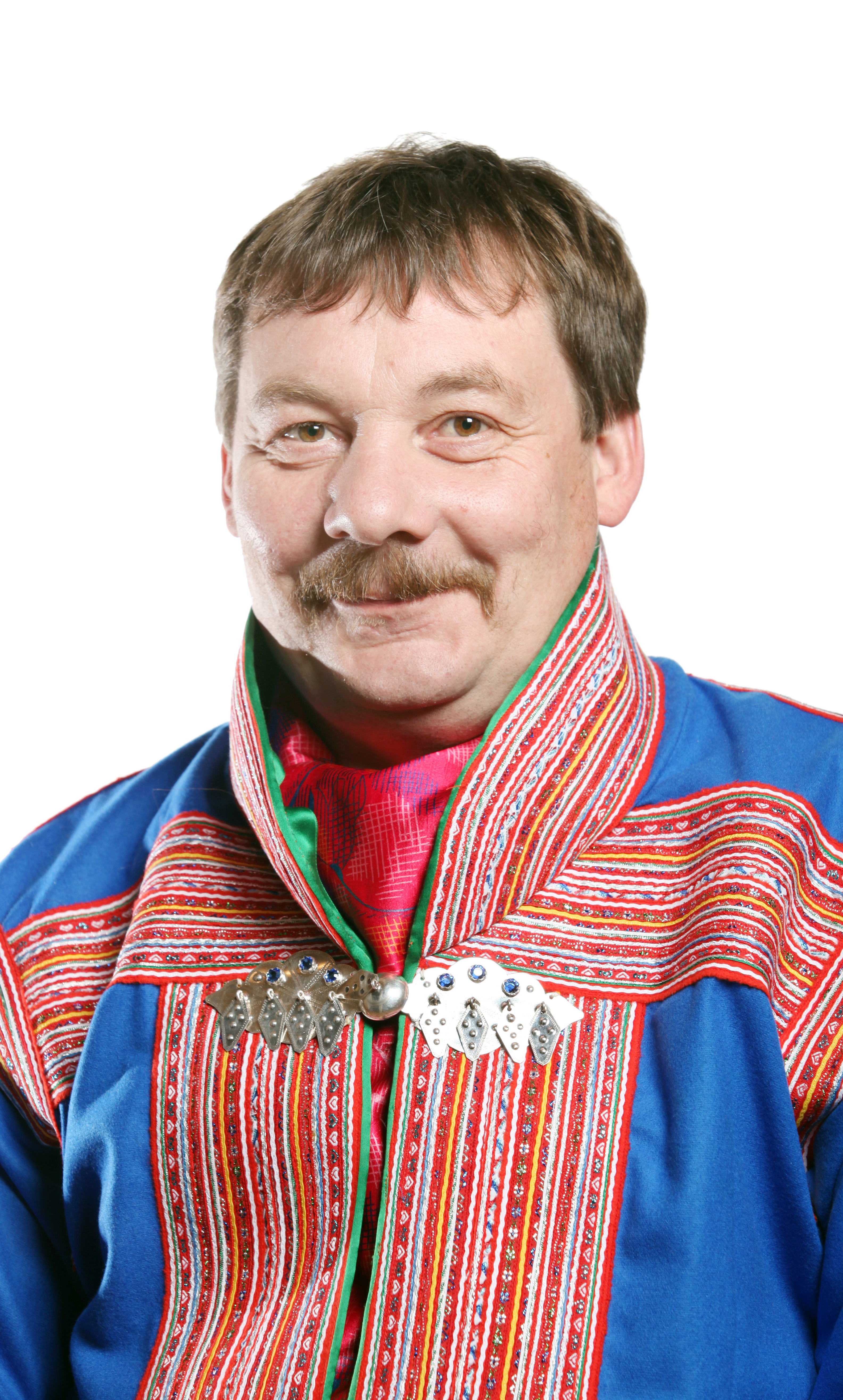 Medlem av næring- og kulturkomitéen, samt valgkomitéen. Foto: Kenneth Hætta / Sametinget.